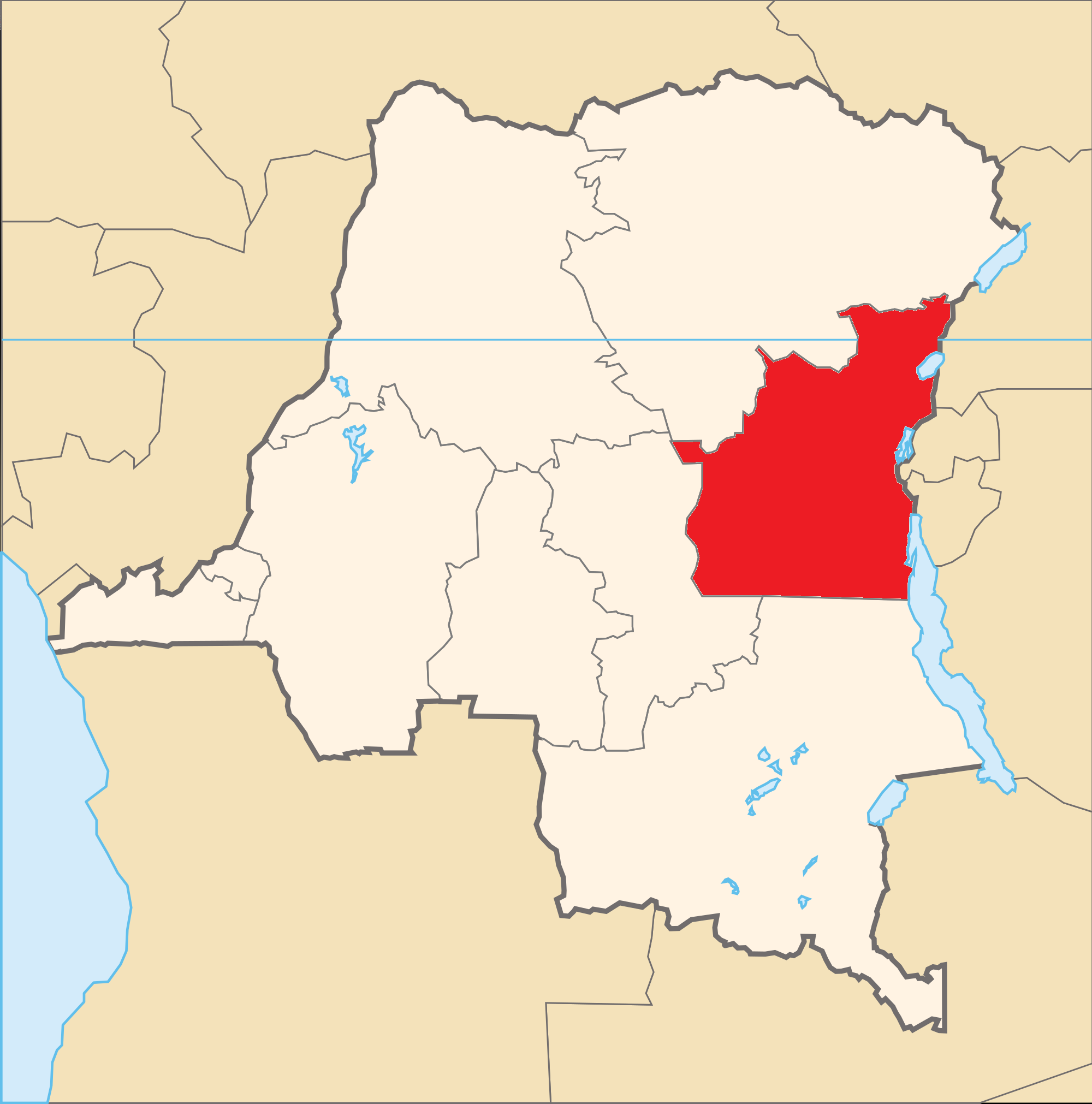 1966年7月1日～1997年10月8日の間のキヴ州の領域。 現在は マニエマ 北キヴ州 南キヴ州 に分割されている。